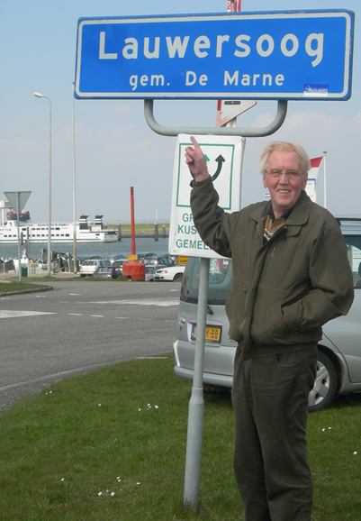 De bedenker bij HET kombord.